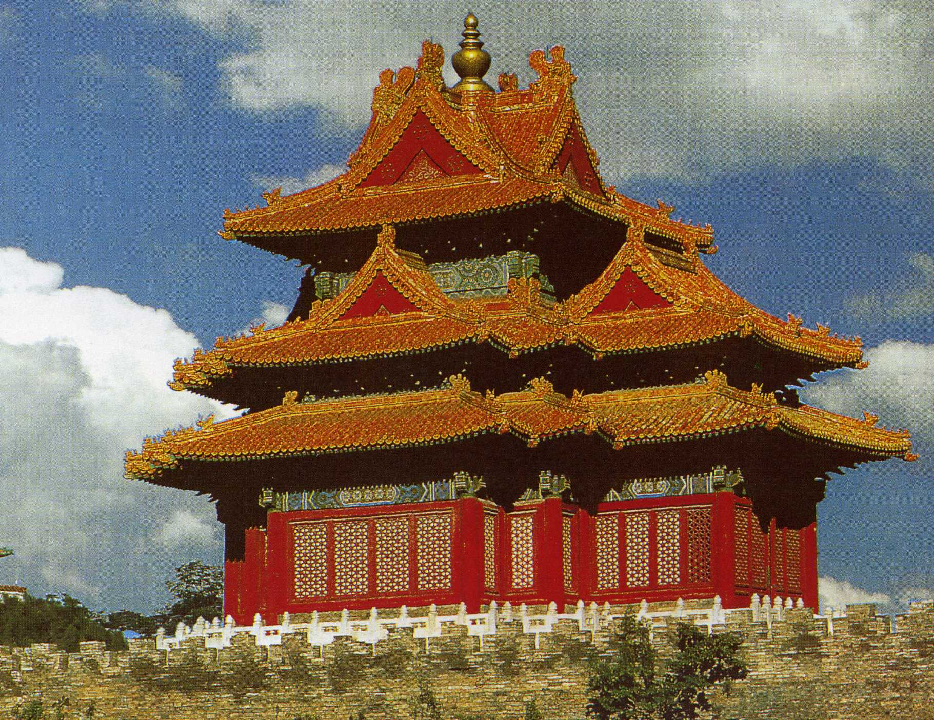 Wachturm der Verbotenen Stadt